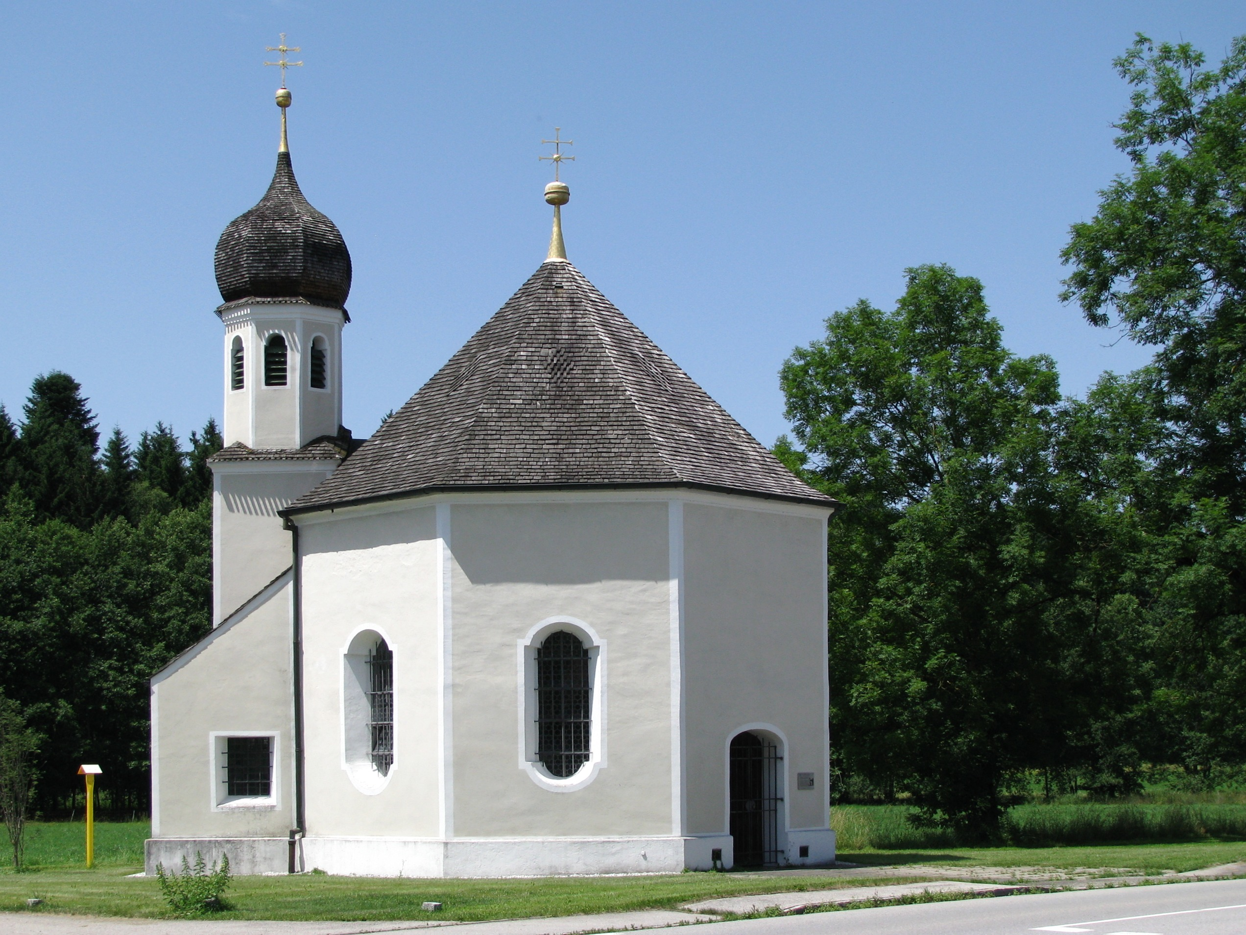 Nikolaus-Kapelle in Geretsried aus östlicher Richtung.